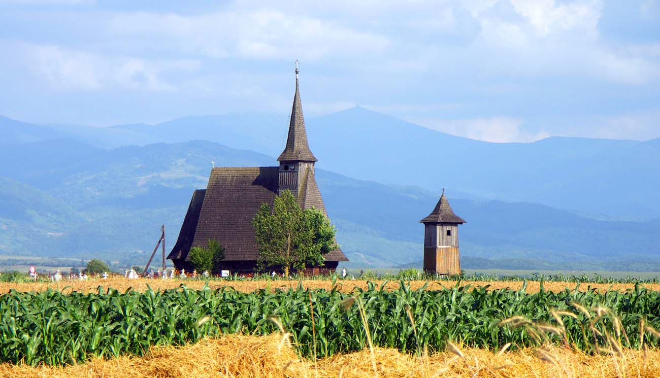 Biserica de lemn din Şebiş, Bihor. Perspectivă dinspre satul Păcăleşti.